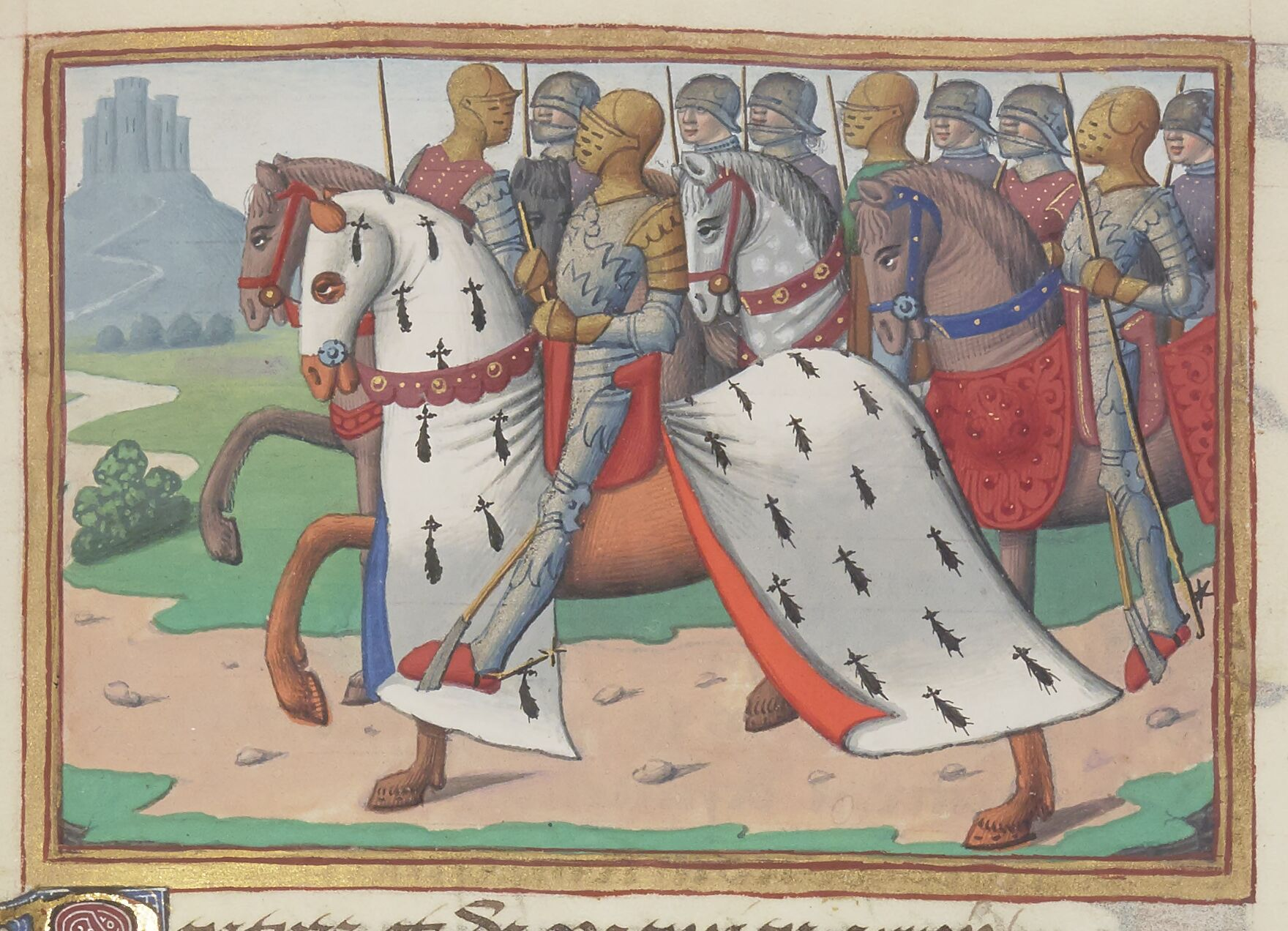 François I° duc de Bretagne et son armée, par Martial d'Auvergne, enluminure issue de l'ouvrage Vigiles de Charles VII, Paris, France, XV°siècle.